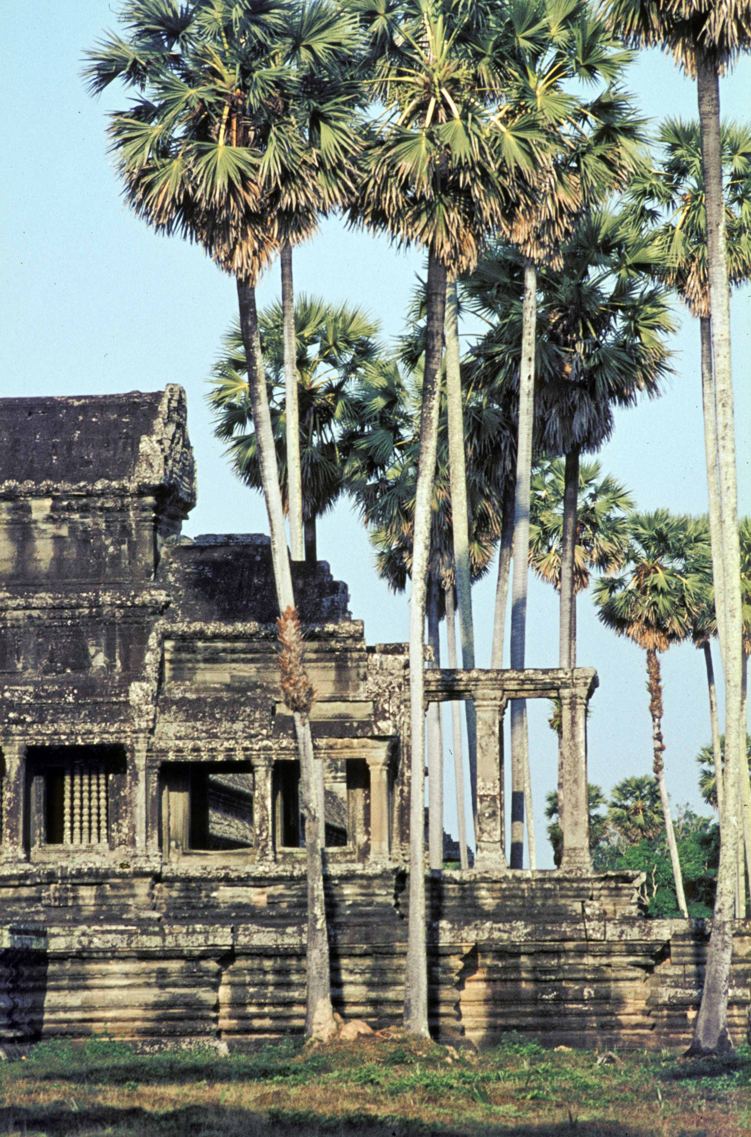 Angkor Wat, Kamboscha